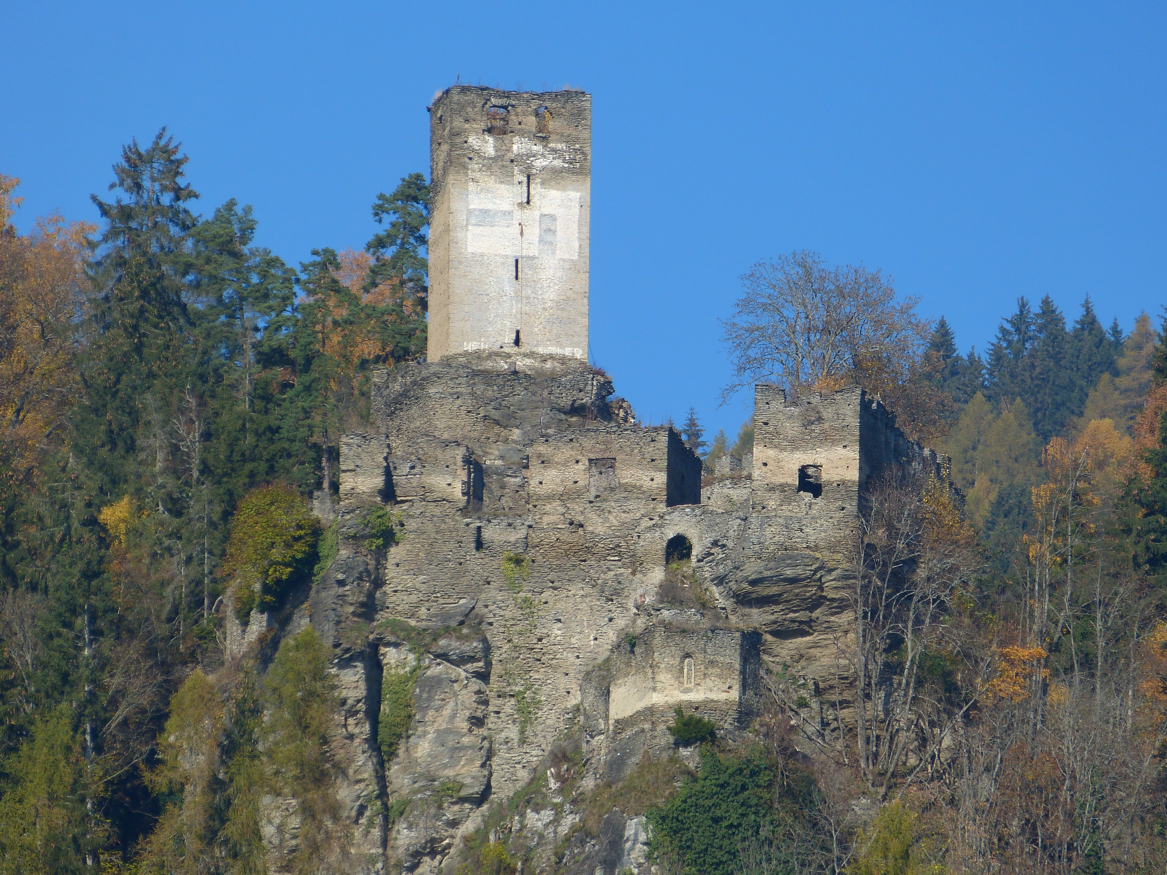 Burgruine Hochkraig: Bergfried (mit Hakenkreuz), davor Palas, rechts davon Wohnturm; davor/darunter: Reste der gotischen Kapelle